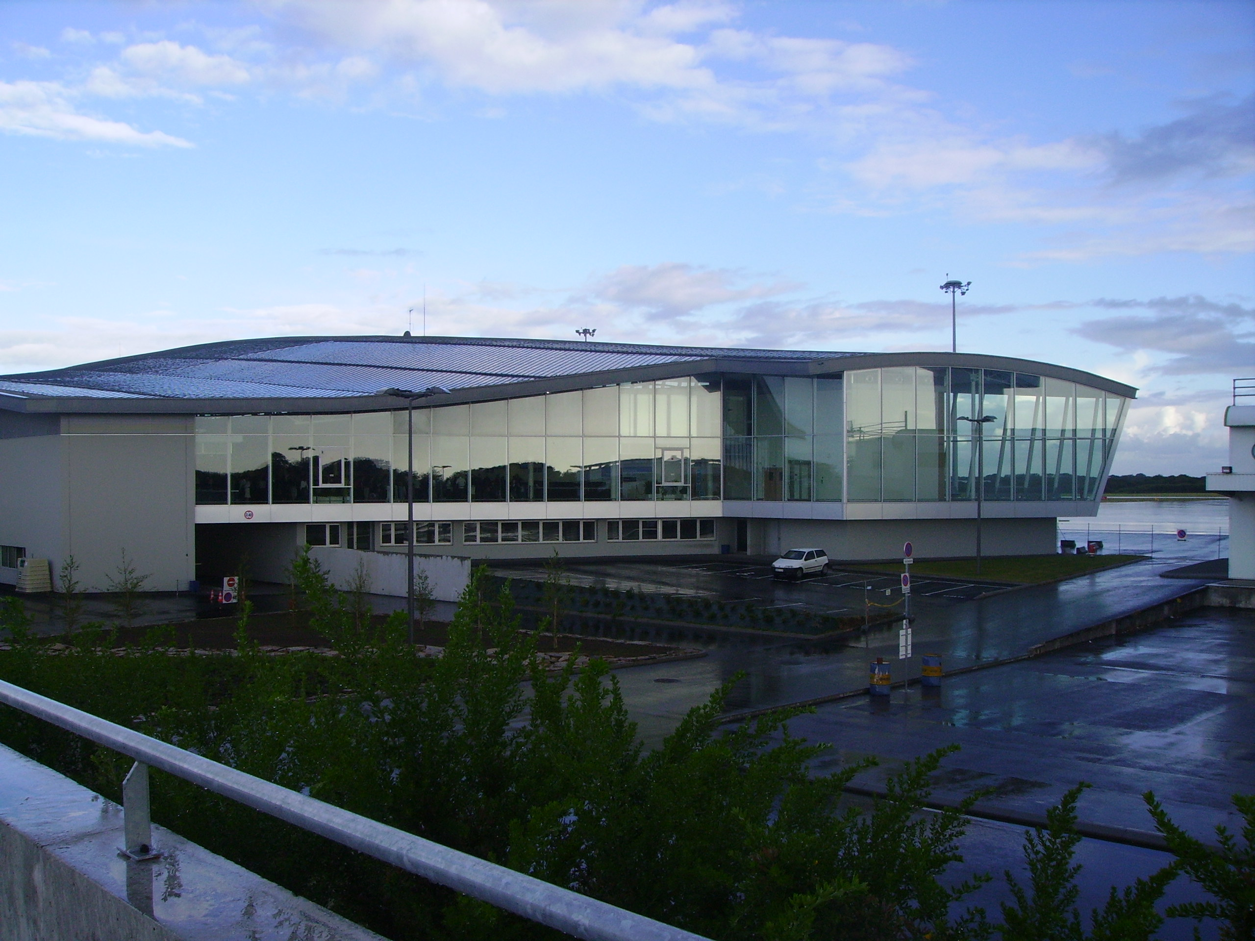 Photographie du nouvel aéroport de Brest Bretagne inauguré en 2007.